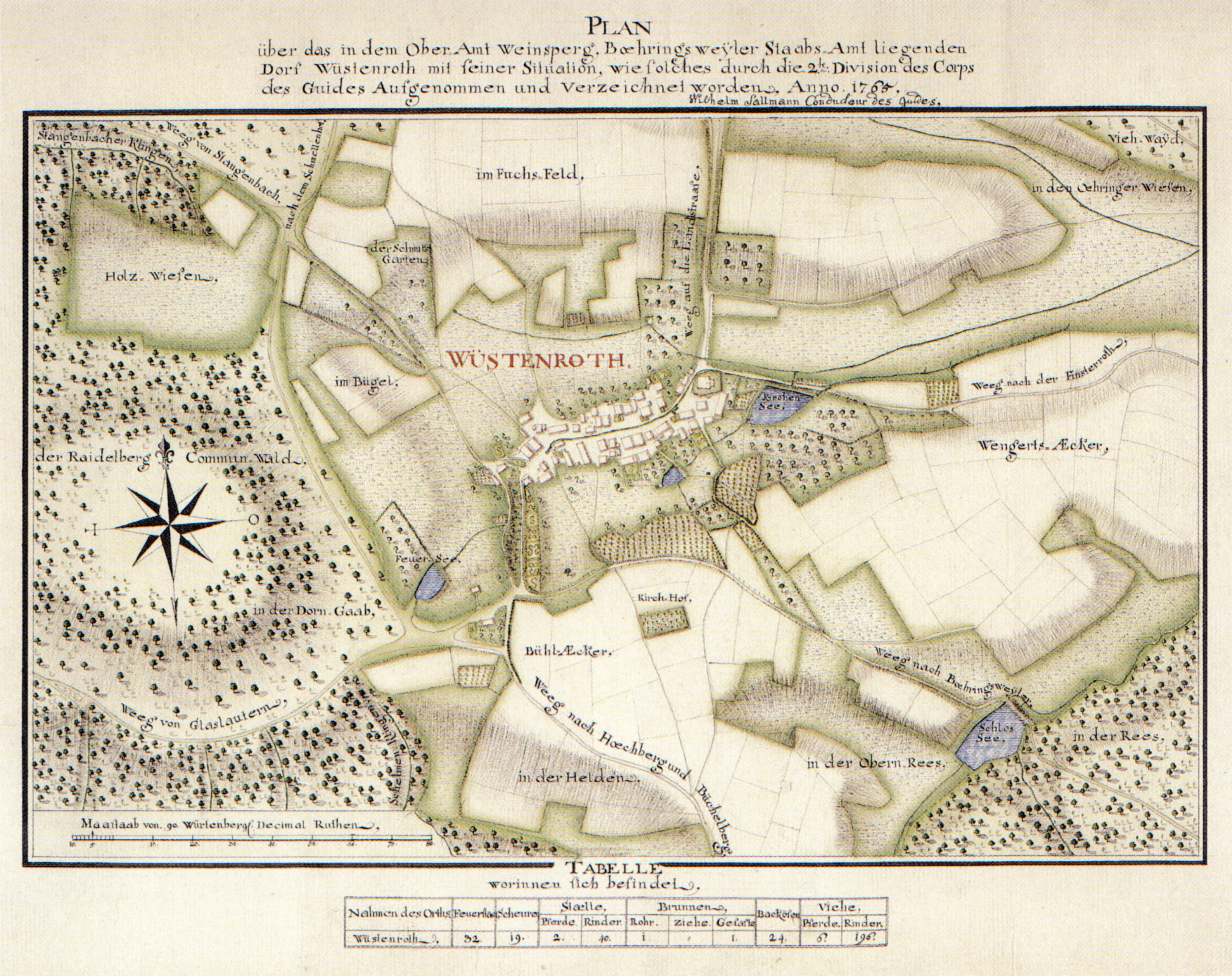 Vom württembergischen Corps des Guides 1765 aufgenommener Plan des Dorfes Wüstenrot, Oberamt Weinsberg